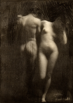 Frank Eugene: Adam und Eva, Fotogravur